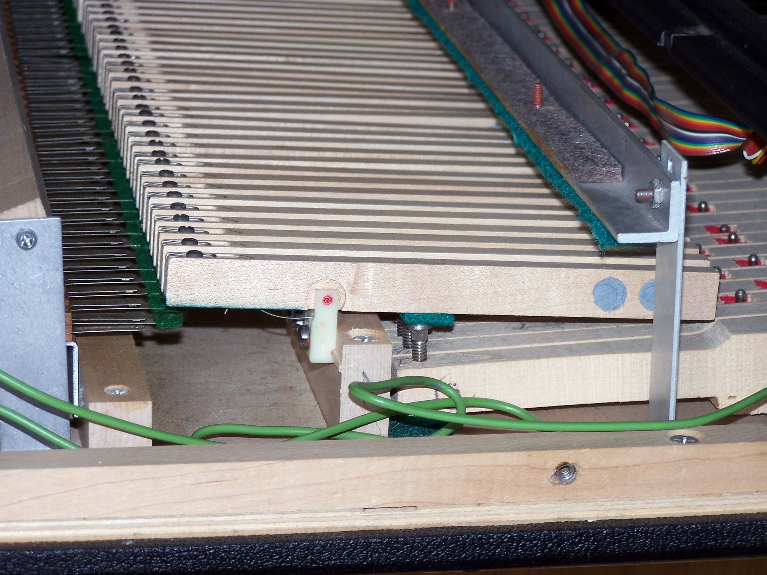 Dettaglio del funzionamento di tastiera